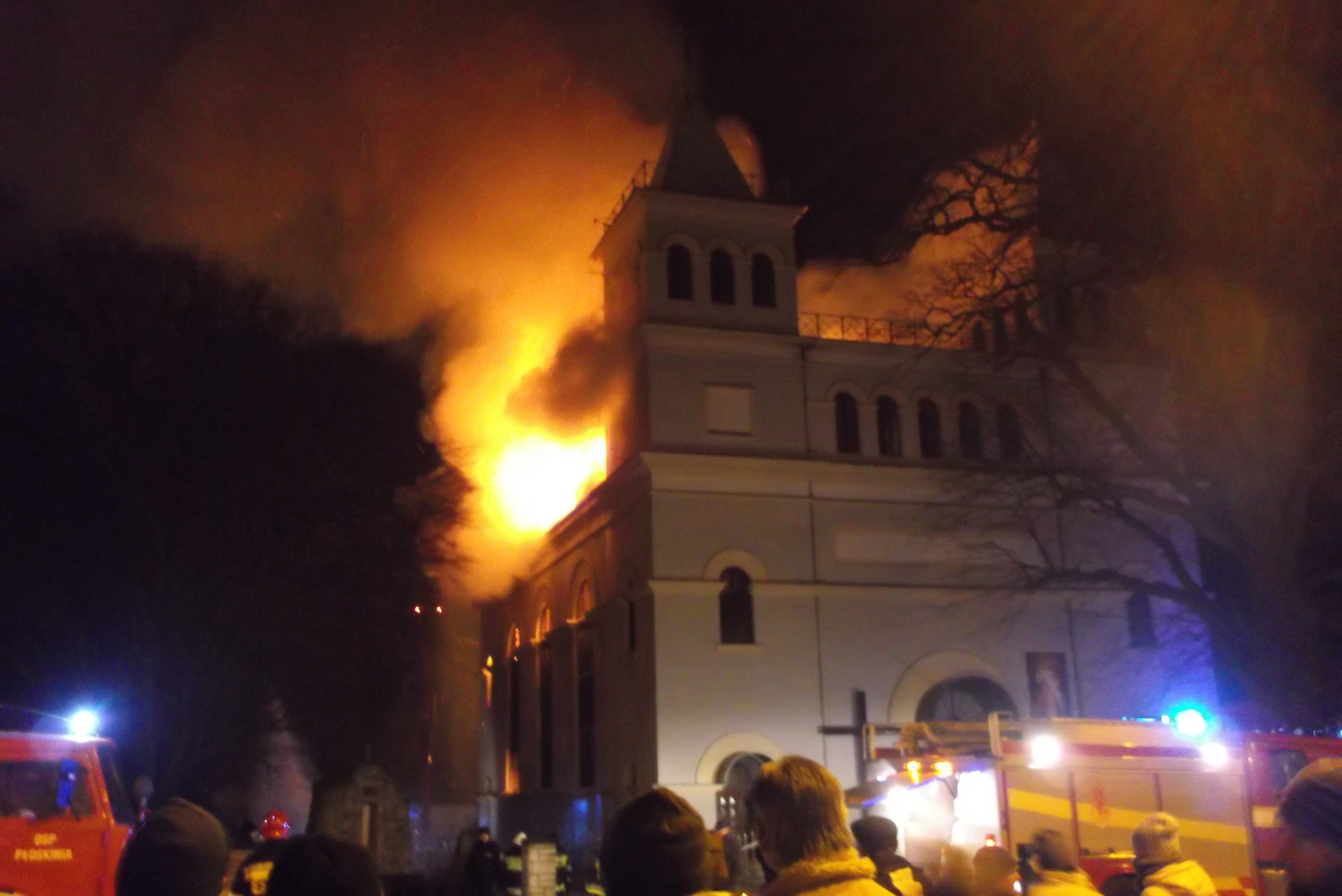 Pożar, kościół św. Antoniego, Braniewo, 3.01.2016.